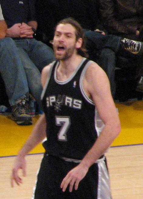 Fabricio Oberto, San Antonio Spurs